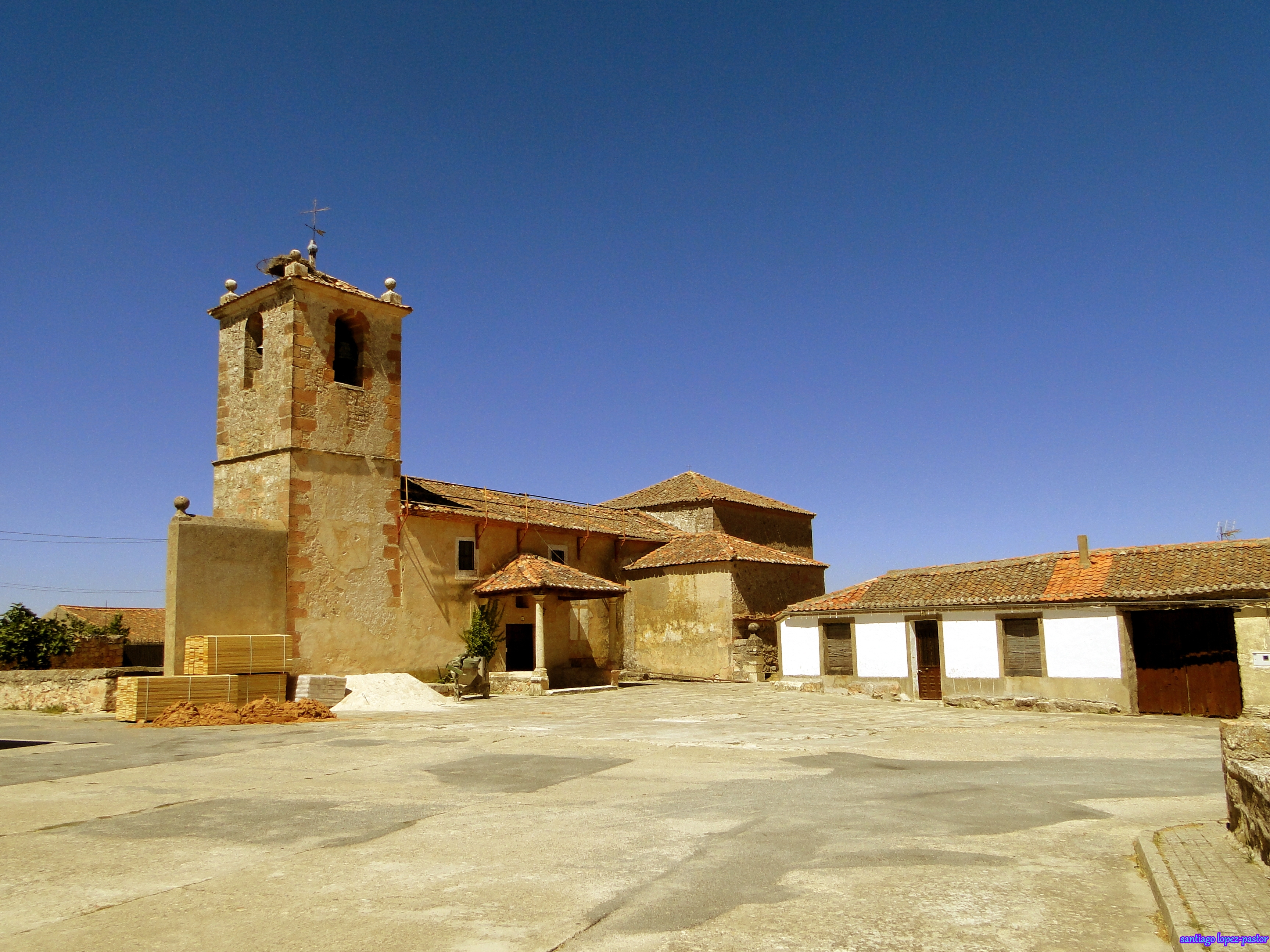 Arahuetes